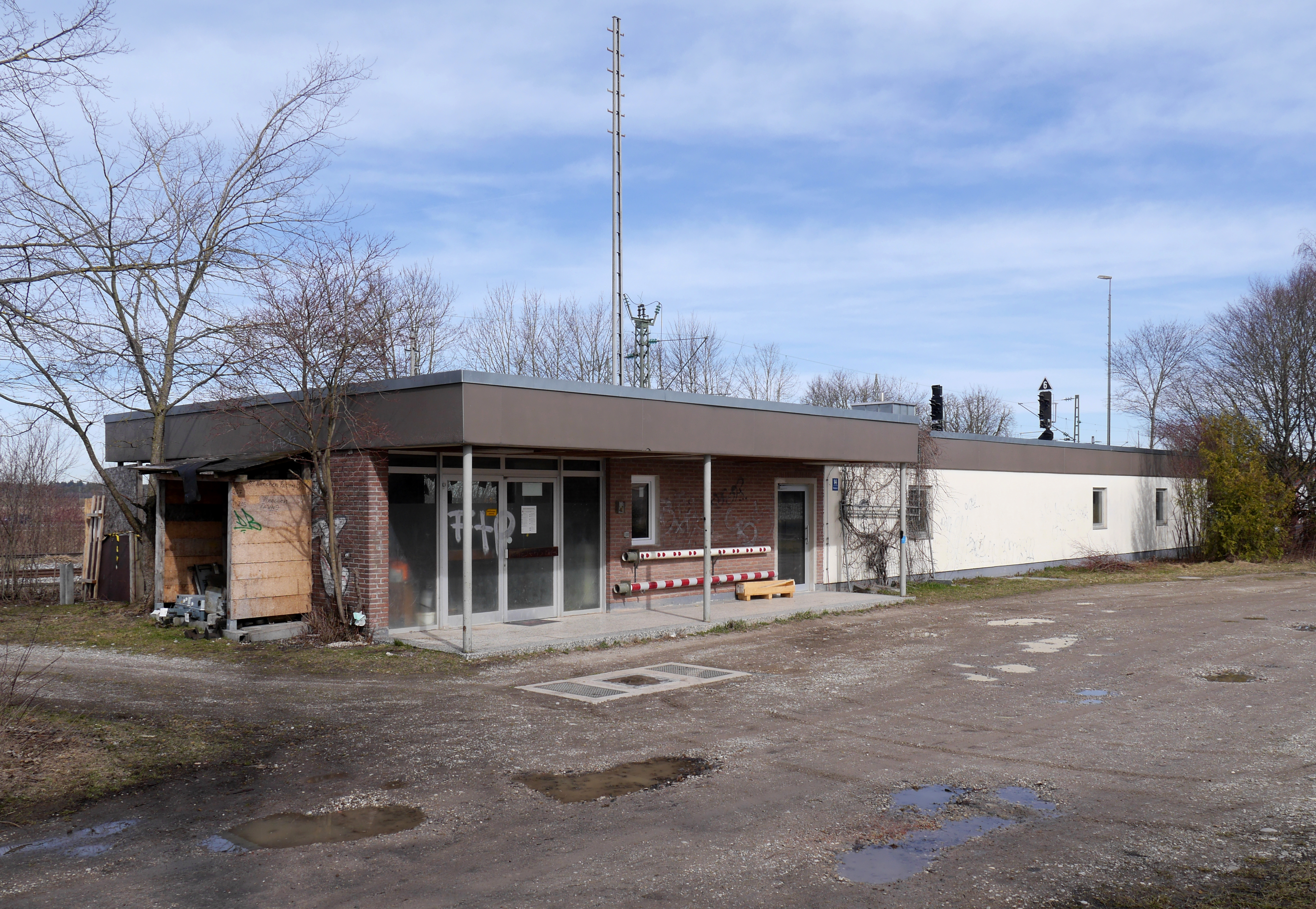 Empfangsgebäude des Bahnhofs München-Freiham von der Straßenseite